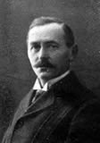 Jakob Brenneisen, St. Alban, Landtagsabgeordneter München